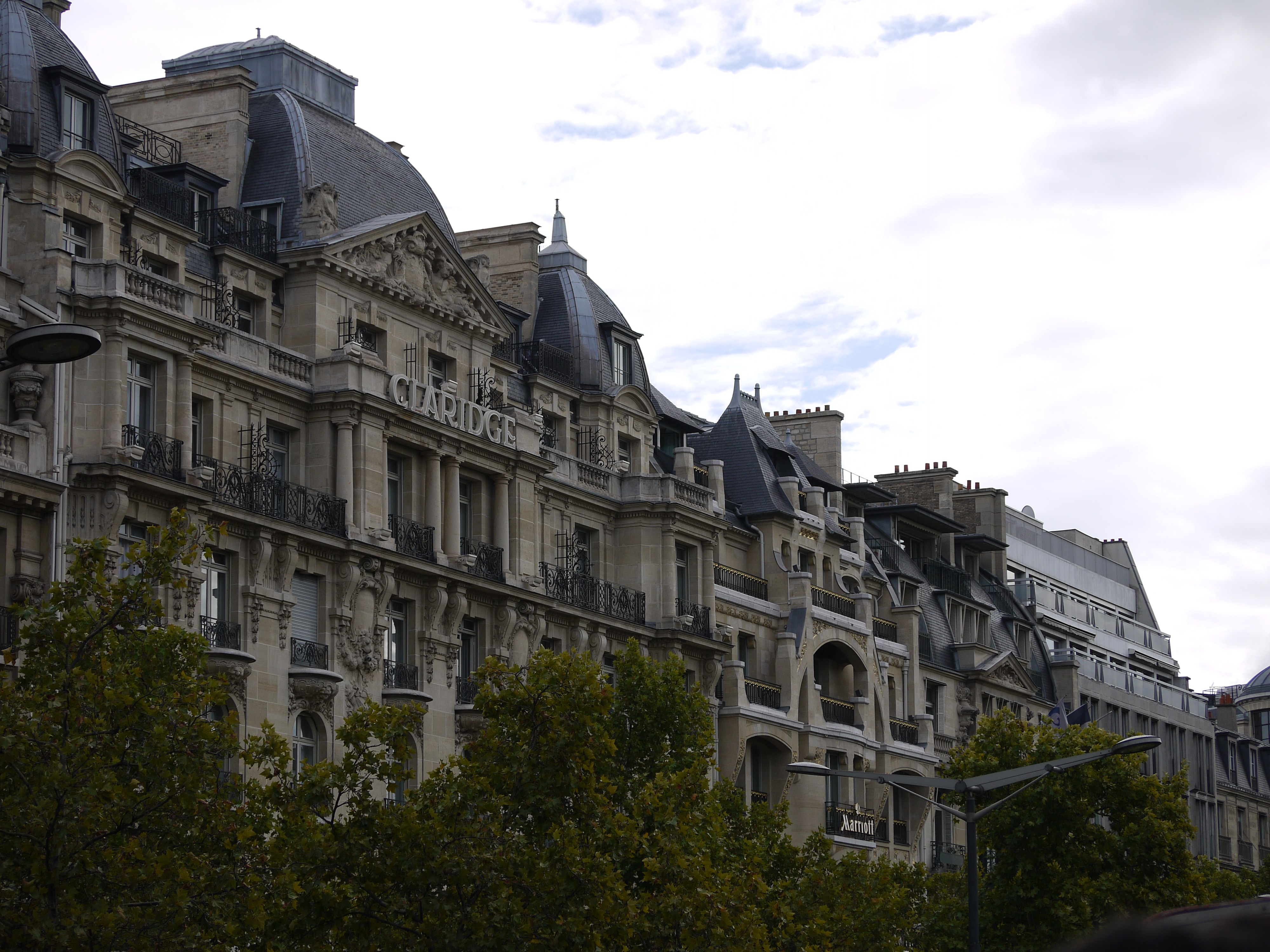 Hôtel Claridge, Paris, 74, Avenue des Champs-Élysées